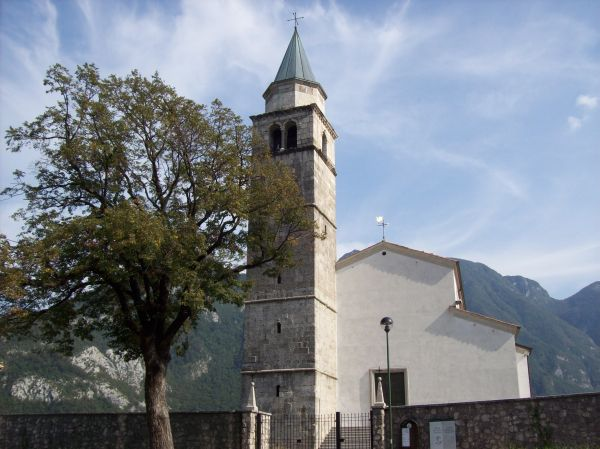 Cavazzo Carnico (UD): la Pieve di Santo Stefano presso Cesclans